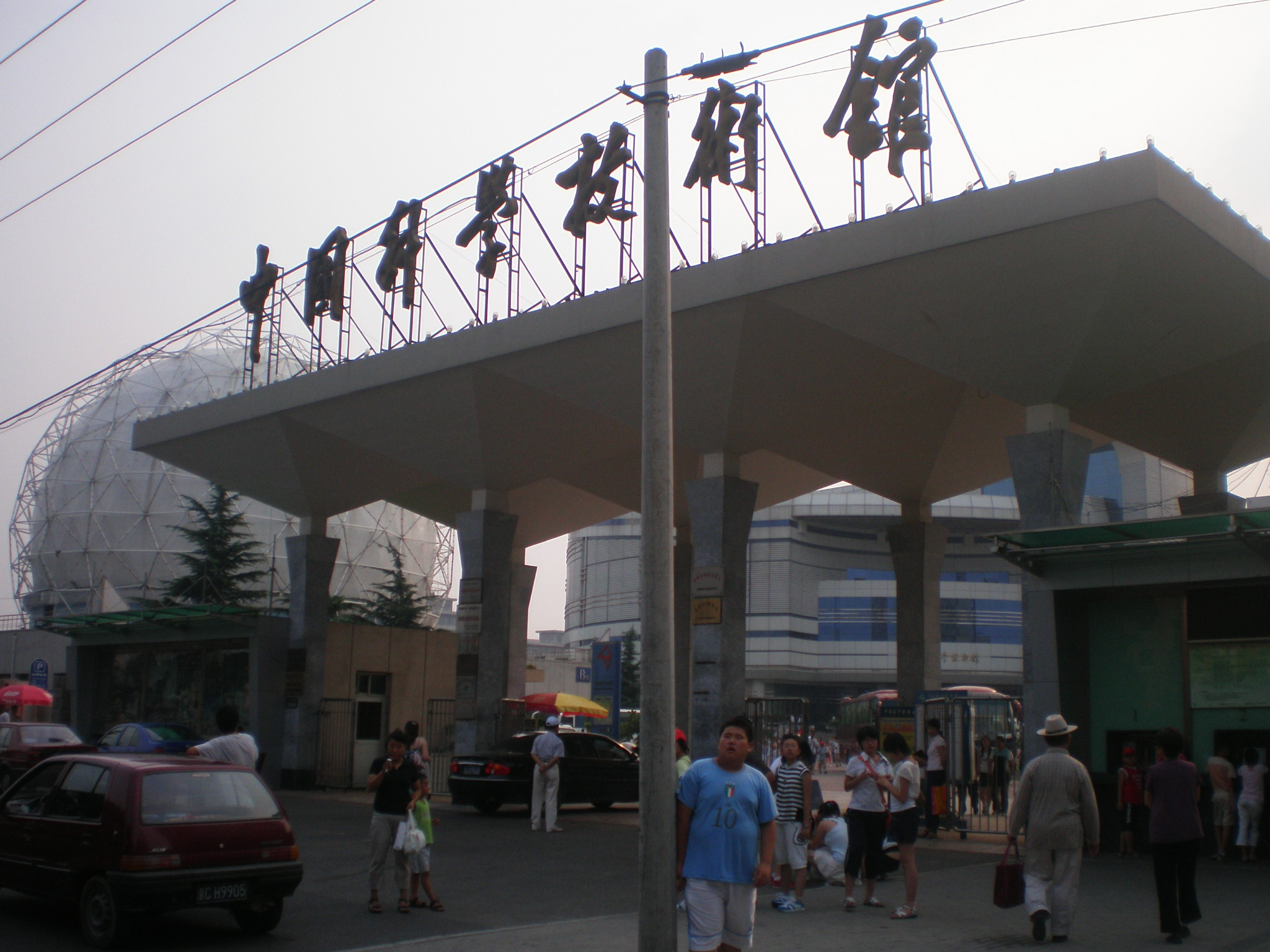 中文（中国大陆）: 中国科学技术馆老馆